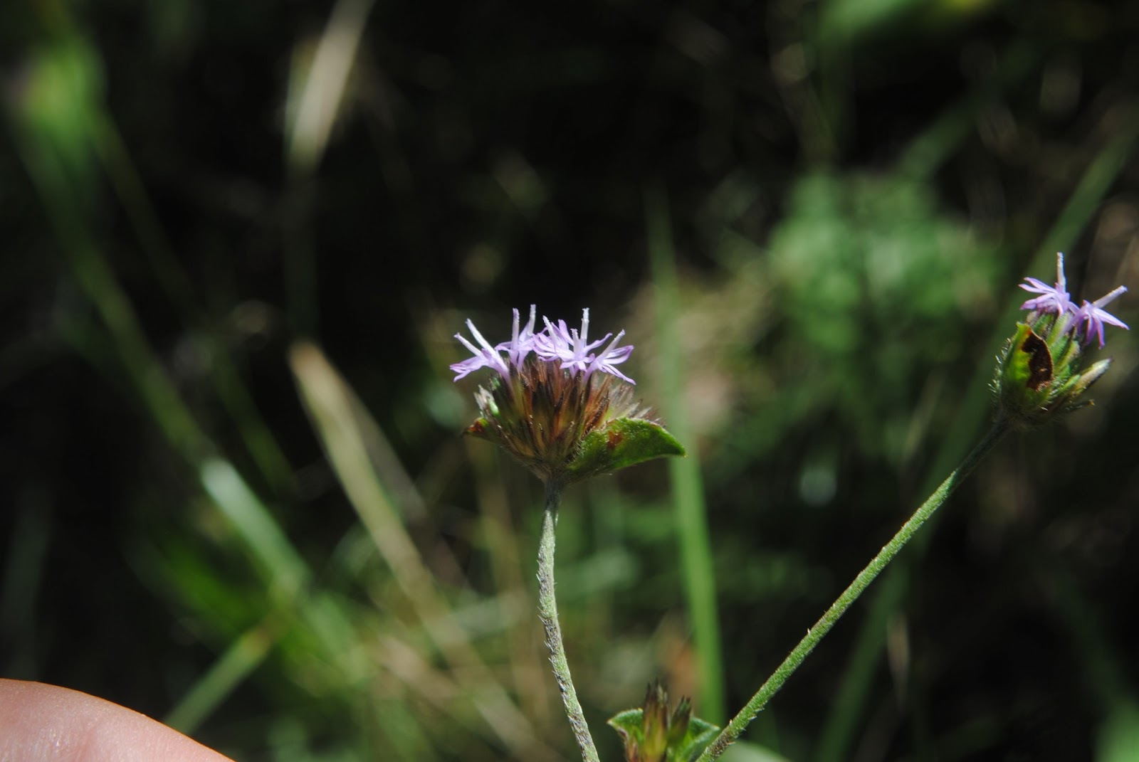 Elephantopus mollis. Asteraceae. Fotos tomadas bajo bosque de quebrada entre rocas al margen del Arroyo Yerbal Chico en la Quebrada de los Cuervos, departamento de Treinta y Tres, Uruguay.